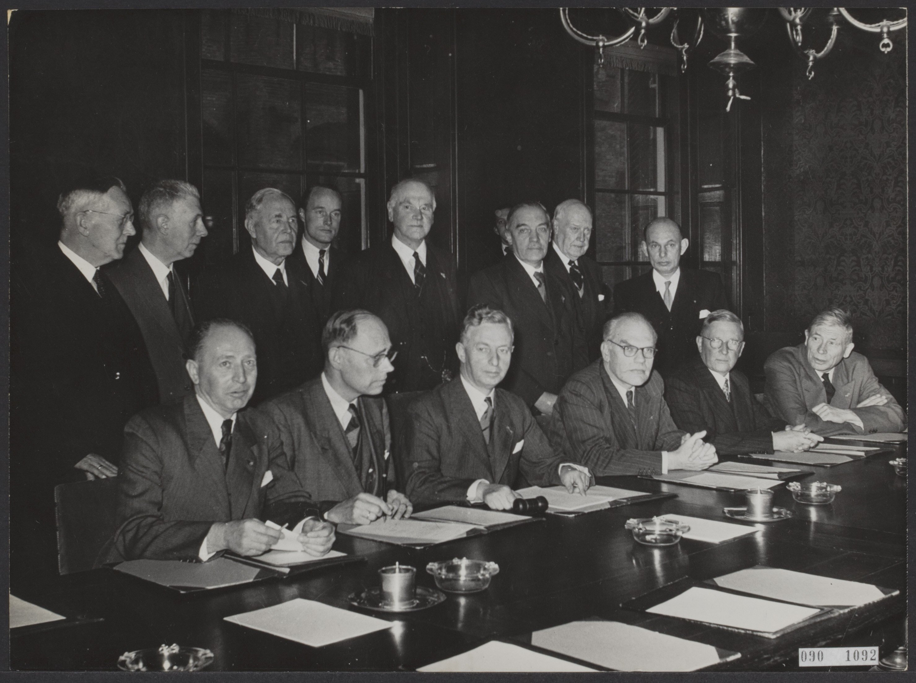 Collectie / Archief : Fotocollectie Elsevier Reportage / Serie : [ onbekend ] Beschrijving : Installatie Deltacommissie Datum : 21 februari 1953 Locatie : Den Haag, Zuid-Holland Trefwoorden : commissies, groepsportretten Instellingsnaam : Statenzaal Fotograaf : Noske, J.D. / Anefo Auteursrechthebbende : Nationaal Archief Materiaalsoort : Foto (zwart/wit) Nummer archiefinventaris : bekijk toegang 2.24.05.02 Bestanddeelnummer : 090-1092